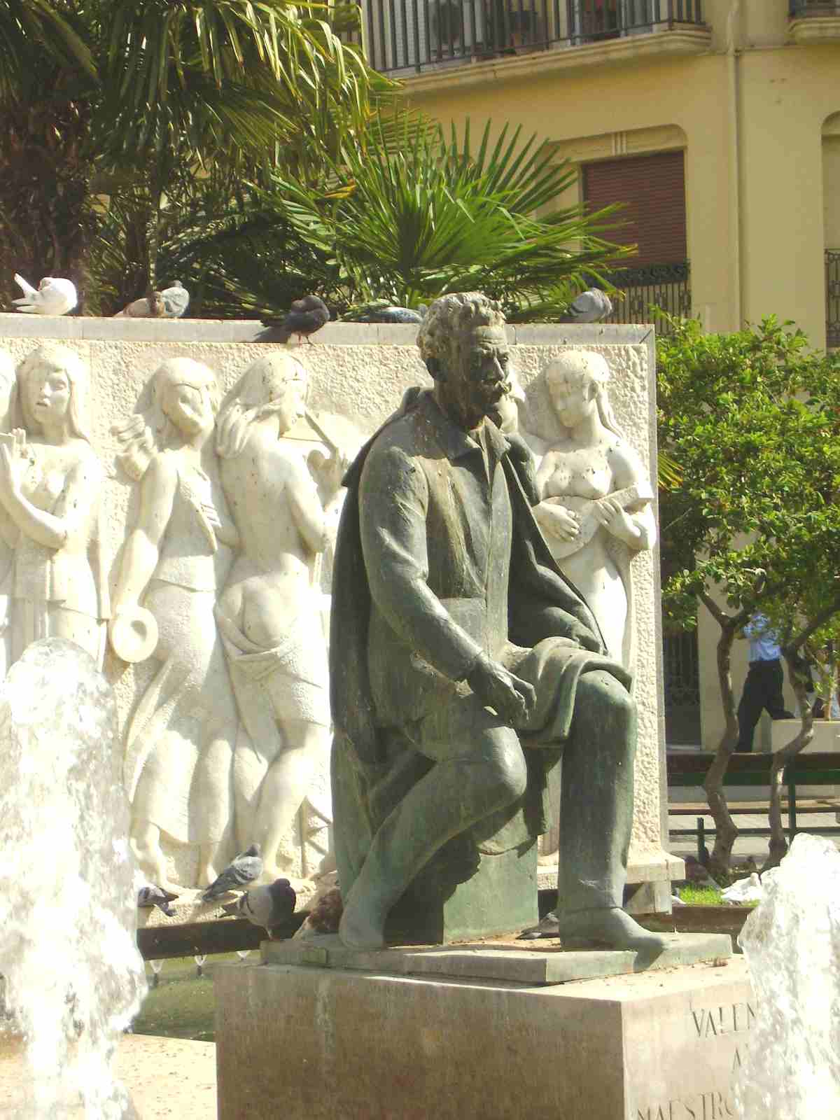 Valencian composer Josep Serrano Memorial, València, Spain